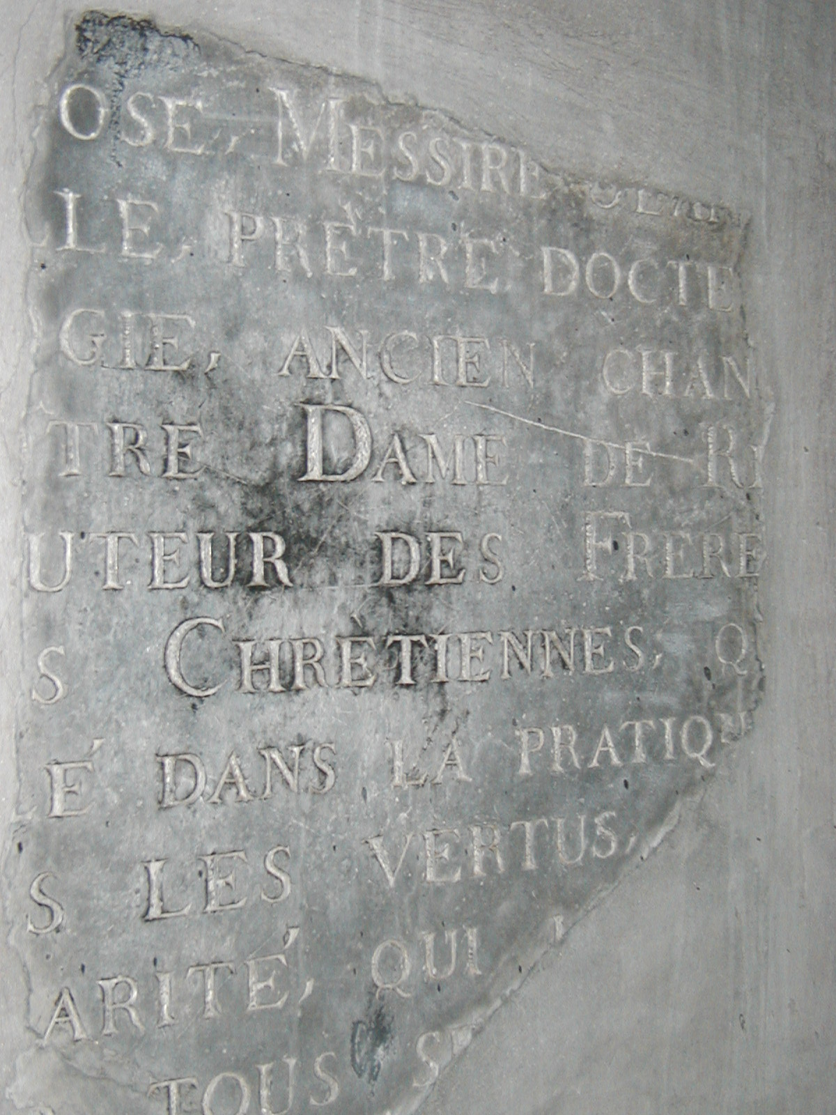 Fragment de la pierre tombale de Saint Jean Baptiste de La Salle - Chapelle du Pensionnat Jean-Baptiste de La Salle - Rouen (76) France